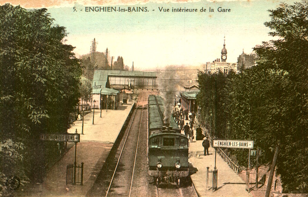 Carte postale ancienne éditée par Abeille, N°5 L'intérieur de la gare d'Enghien les bains On distingue au fond l'aiguillage donnant accès à la ligne du Refoulons vers Montmorency